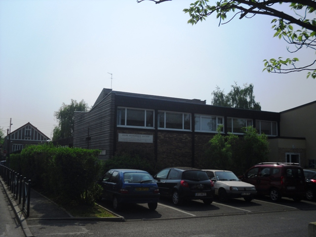 L'église évangélique baptiste de Ris-Orangis (91)